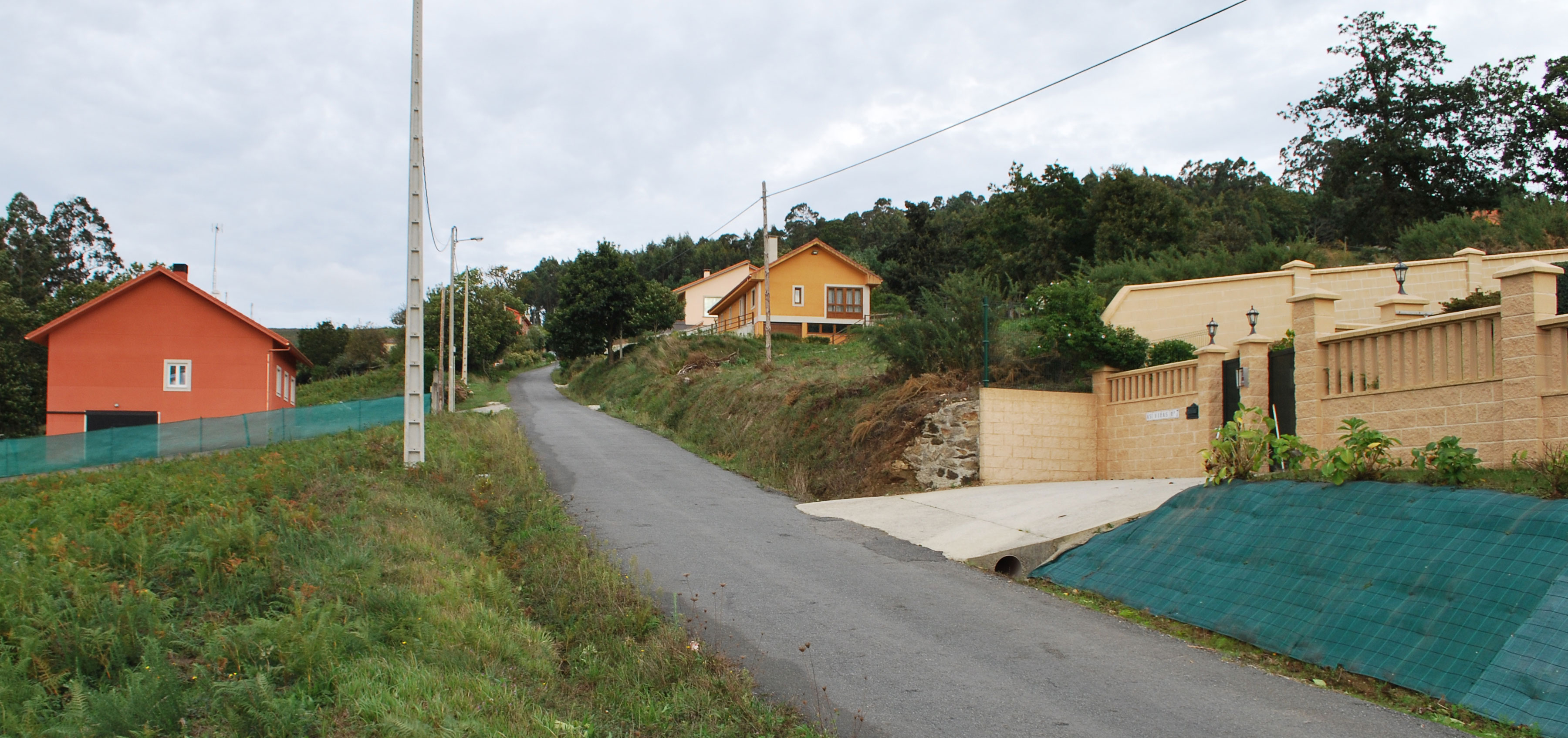 A Esfarrapa Barrañán Arteixo A Coruña Galiza Spain